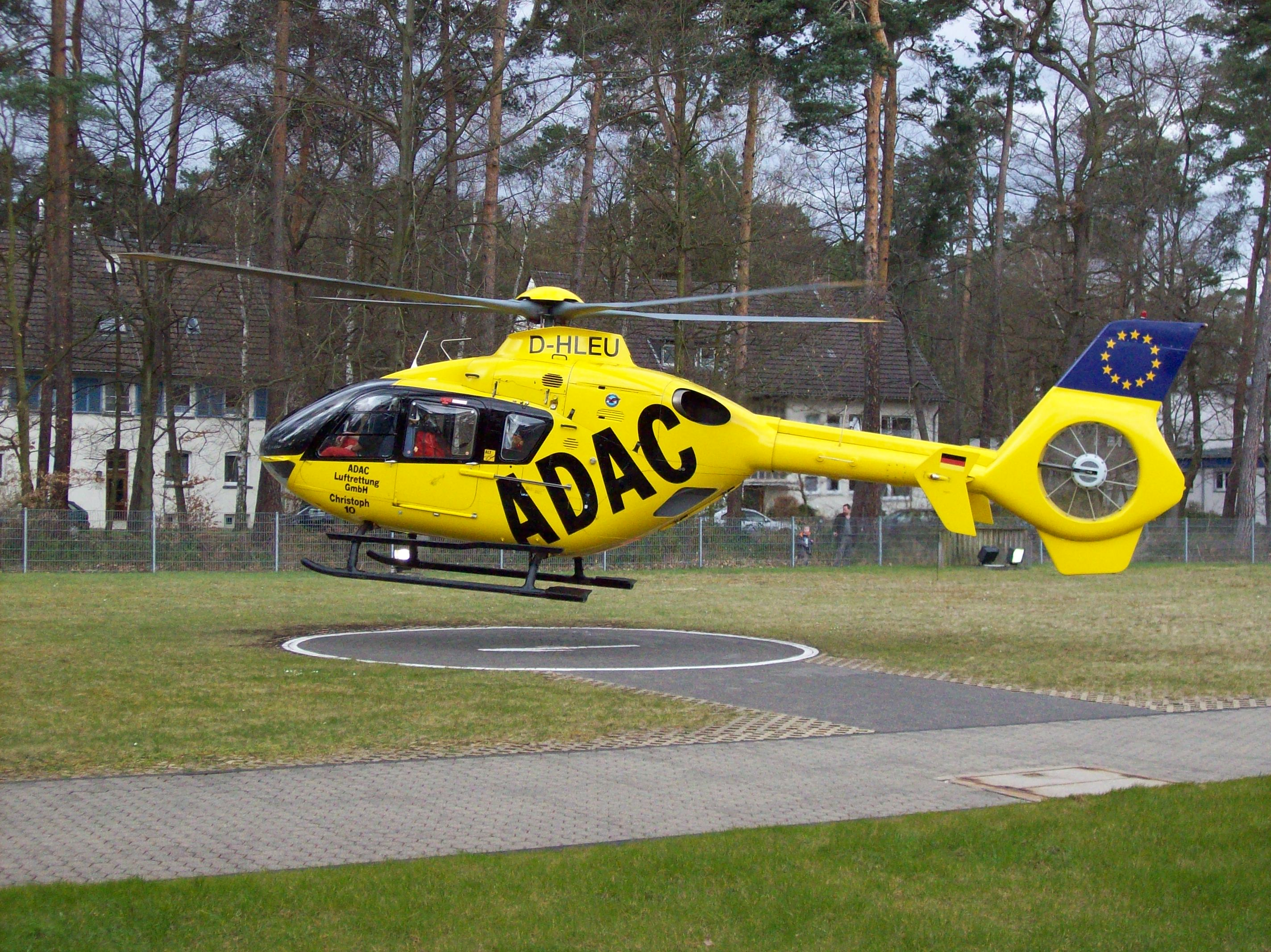 Helikoptéra německého autoklubu ADAC